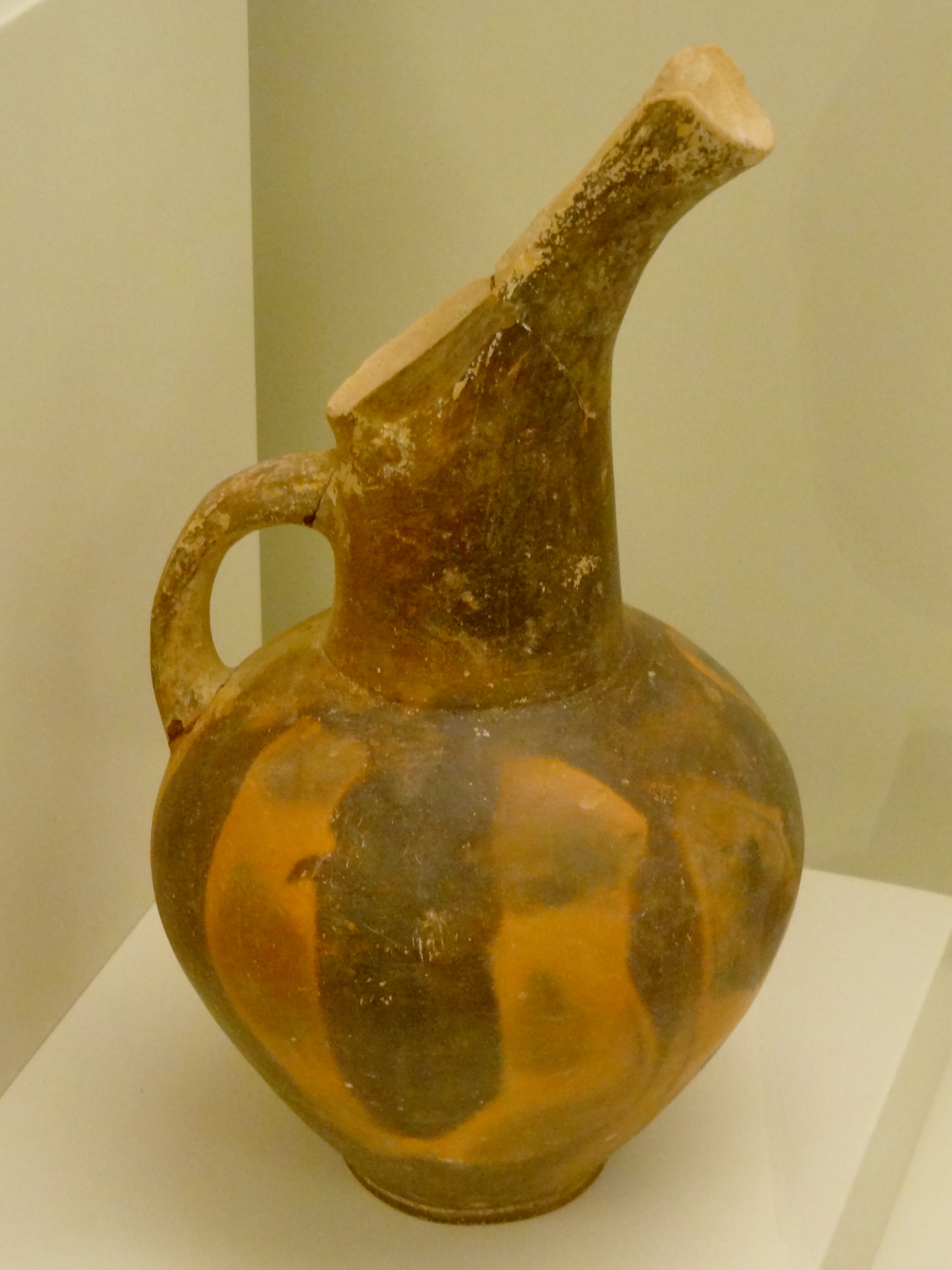 Tonkrug/Schnabelkanne mit geflammtem Dekor im „Vassiliki-Stil“ (Vorpalastzeit, um 2500 v. Chr.) aus Vasiliki (Ierapetra), ausgestellt im Archäologischen Museum Iraklio, Kreta, Griechenland